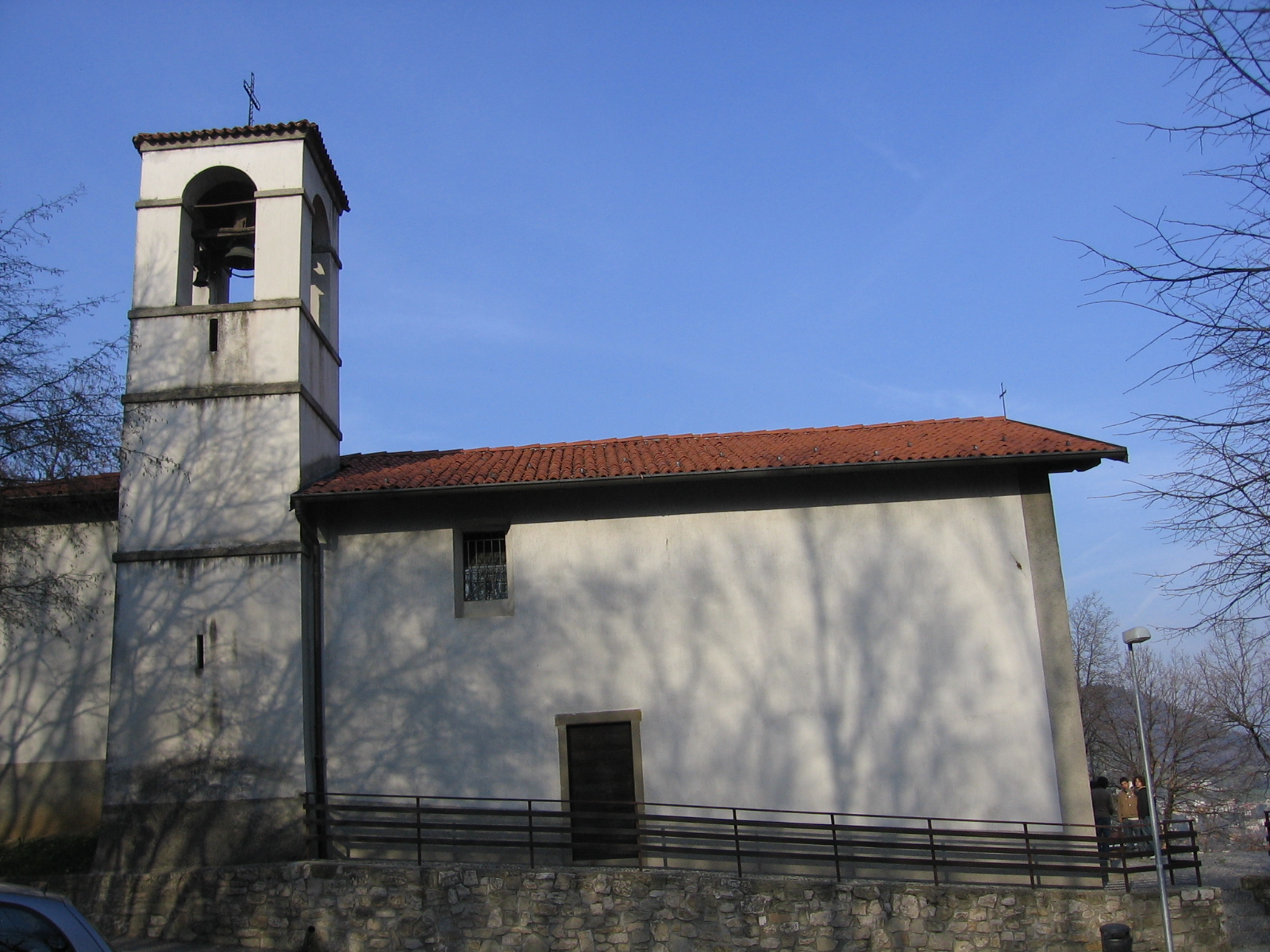 Ranica, Bergamo, Italia